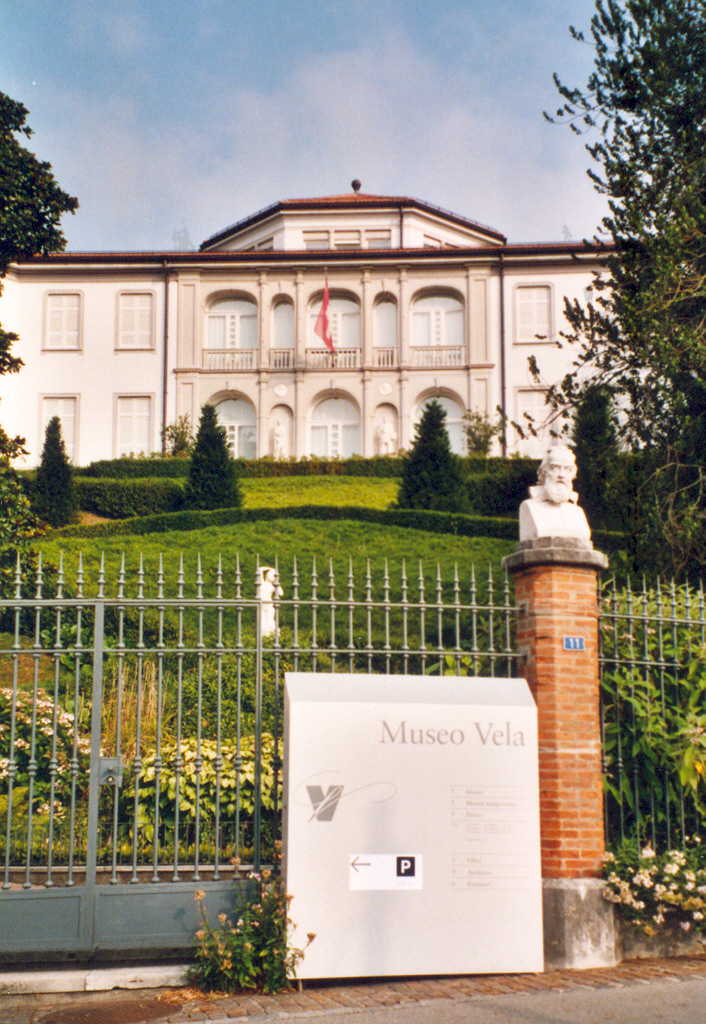 Aufnahme 26. Juli 2005, Museo Vela in Ligornetto, Kanton Tessin, Schweiz. Fotograf Peter Berger (selbst fotografiert). Lizenzstatus "GNU-FDL"